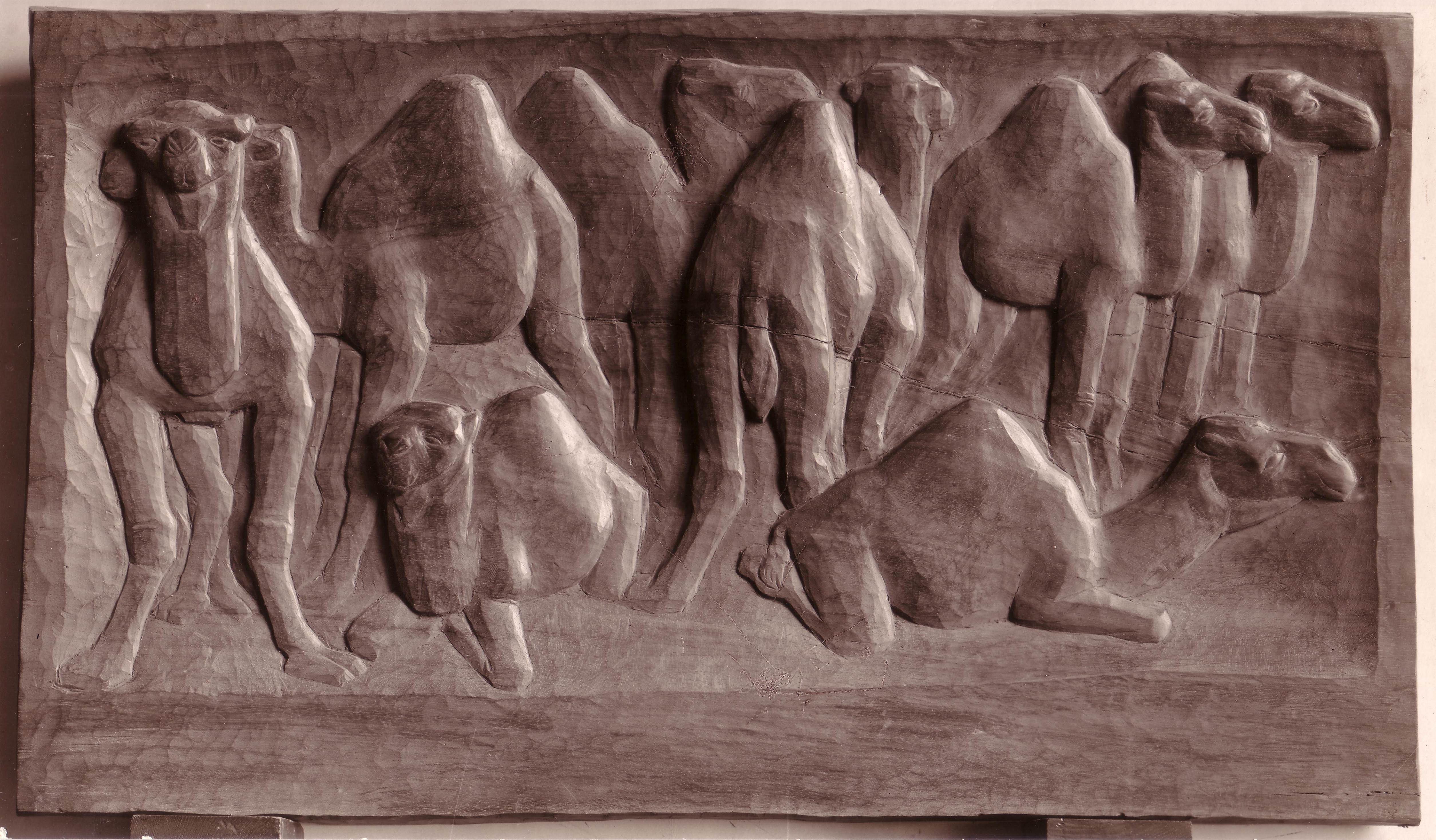 Kamelherde (Holzrelief) von Philipp Harth (1927)